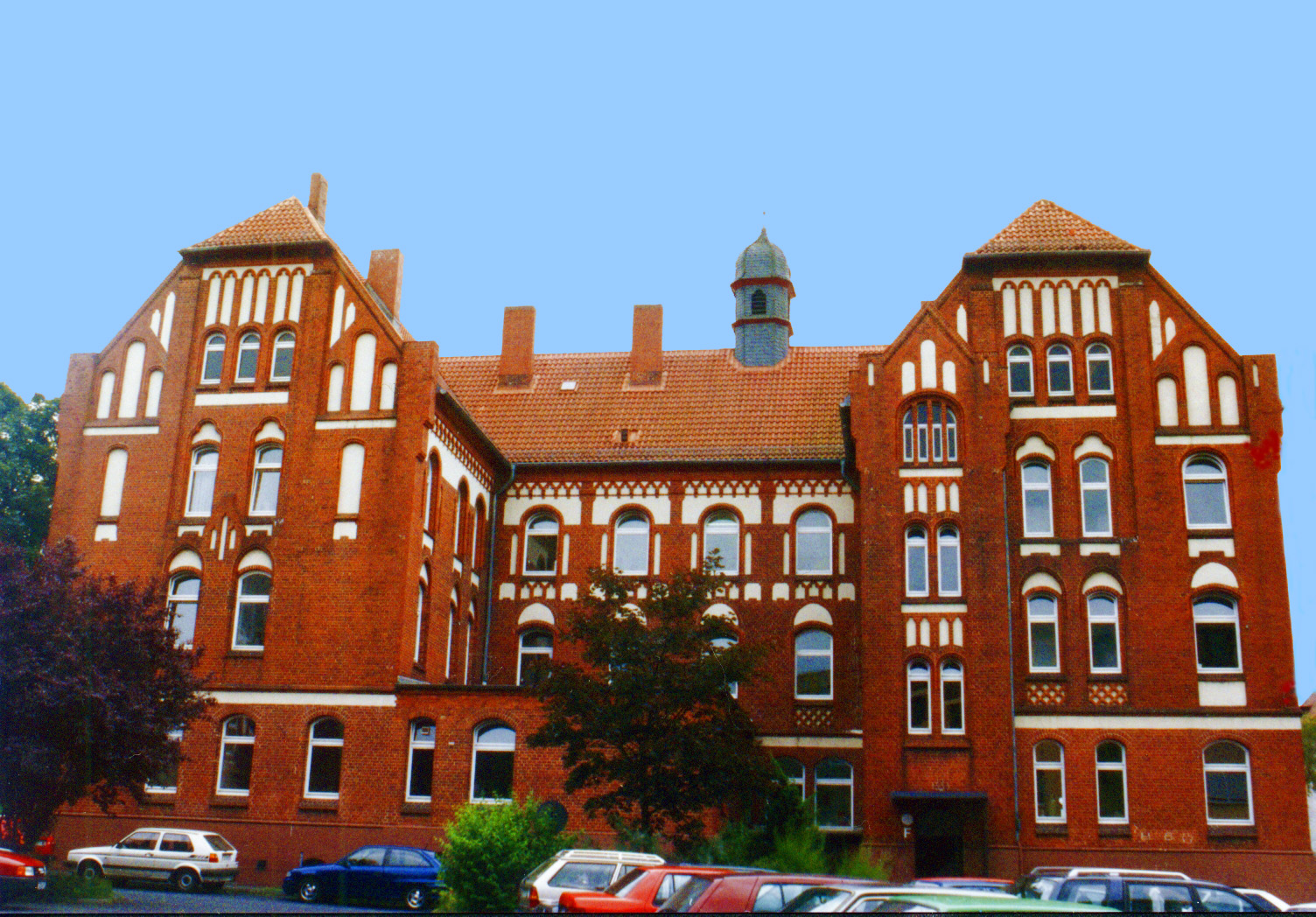 Fulda, Kasernengebäude, ehemaliges Stabsgebäude, heute Marquardstrasse 31-33, Innenhofansicht, Architekt August Menken (1858-1903).